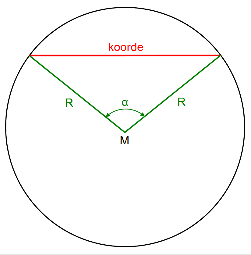 Koorde in cirkel met middelpuntshoek en straal